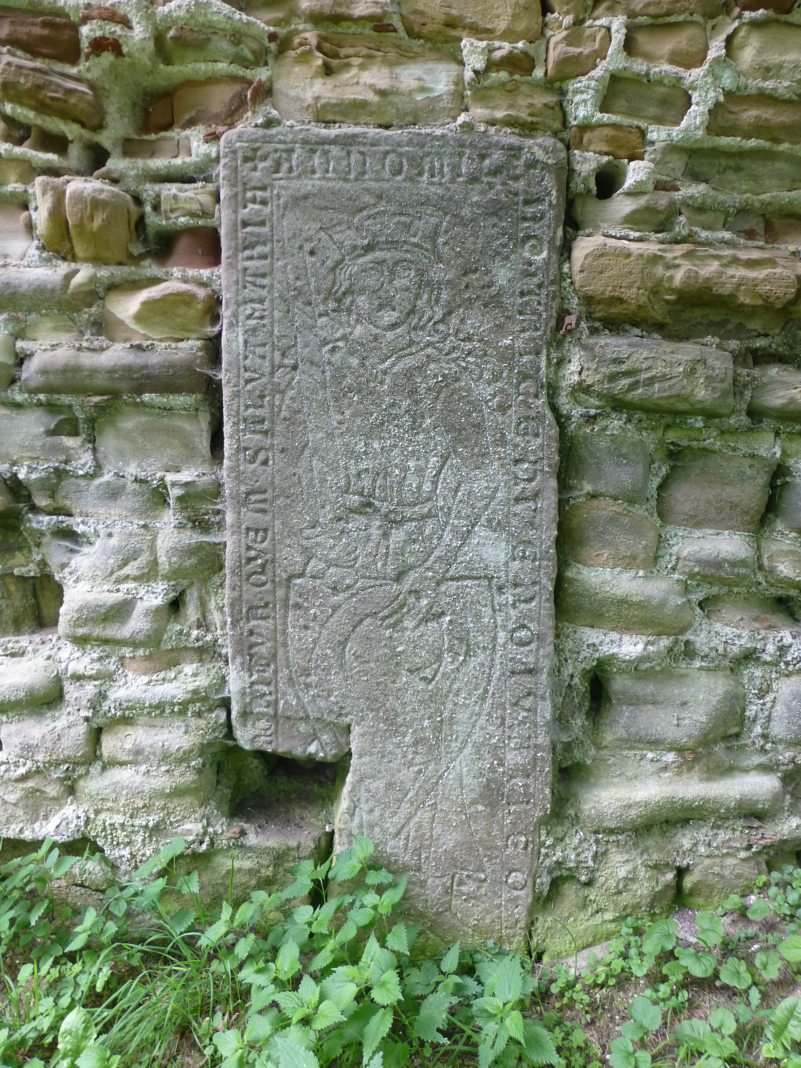 Grabstein/platte an der Kirchenruine Kirchdorf: vermutlich von Heidenreich IV. Rieme (gestorben 1300); Inschrift nach Letzners "Dasselische ind Einbeckische Chronica": Anno milleno trecenteno Iubileo Heidenreich Corrigia mivitur, quem saluat sancta Maria